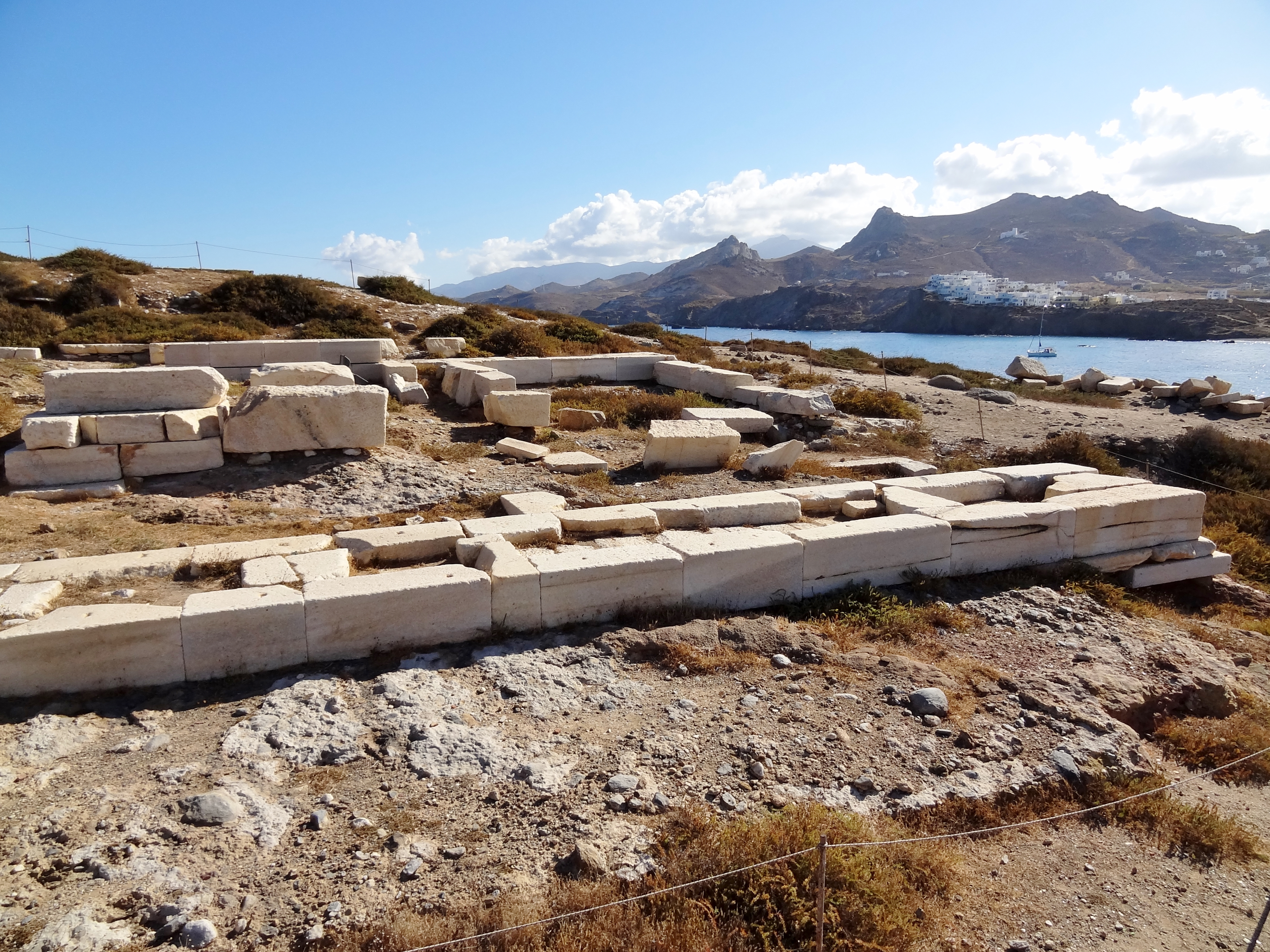 Reste des ehemaligen unvollendeten Apollontempel auf der Insel Palatia in Chora, Naxos, Kykladen, Griechenland